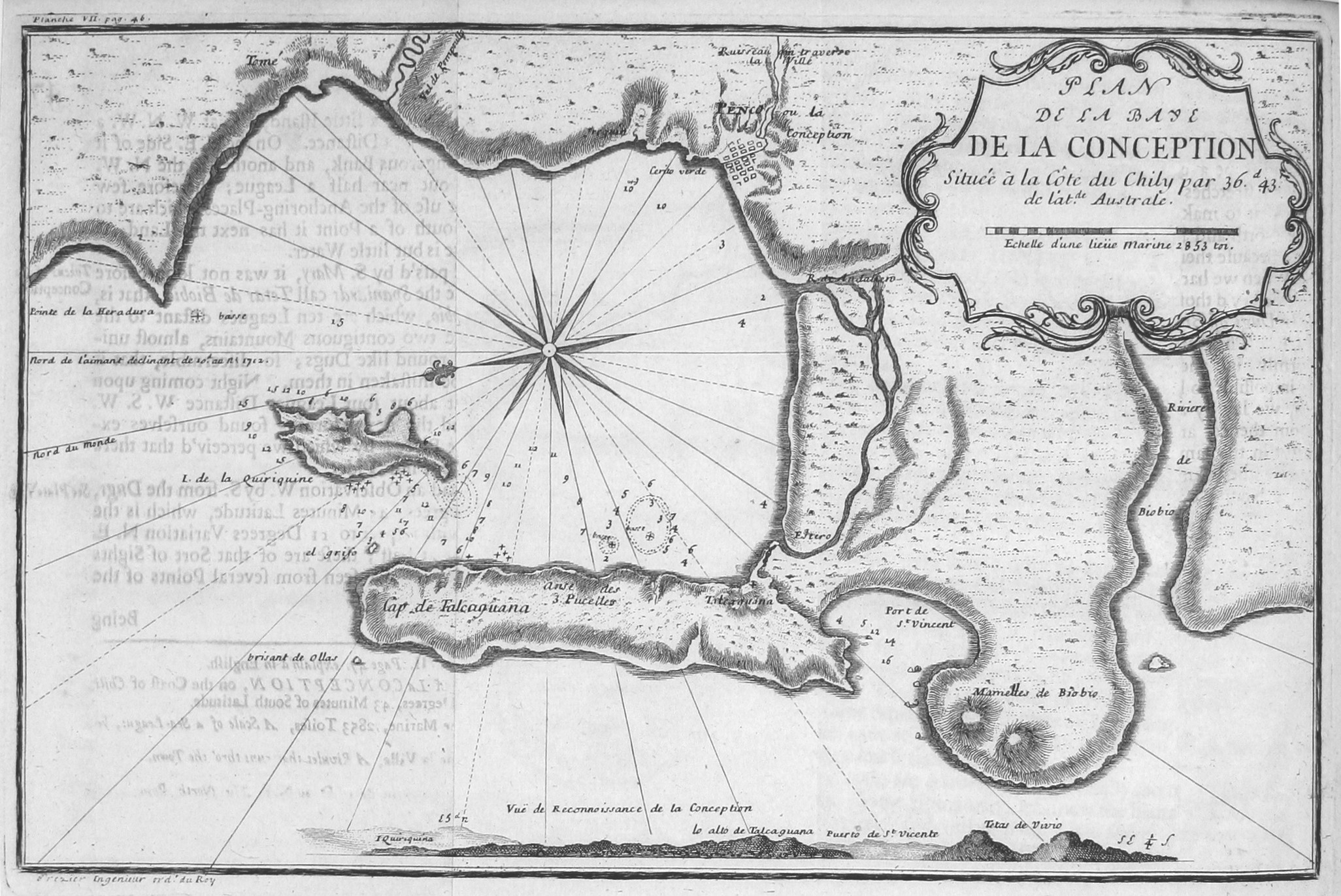 Planche VII